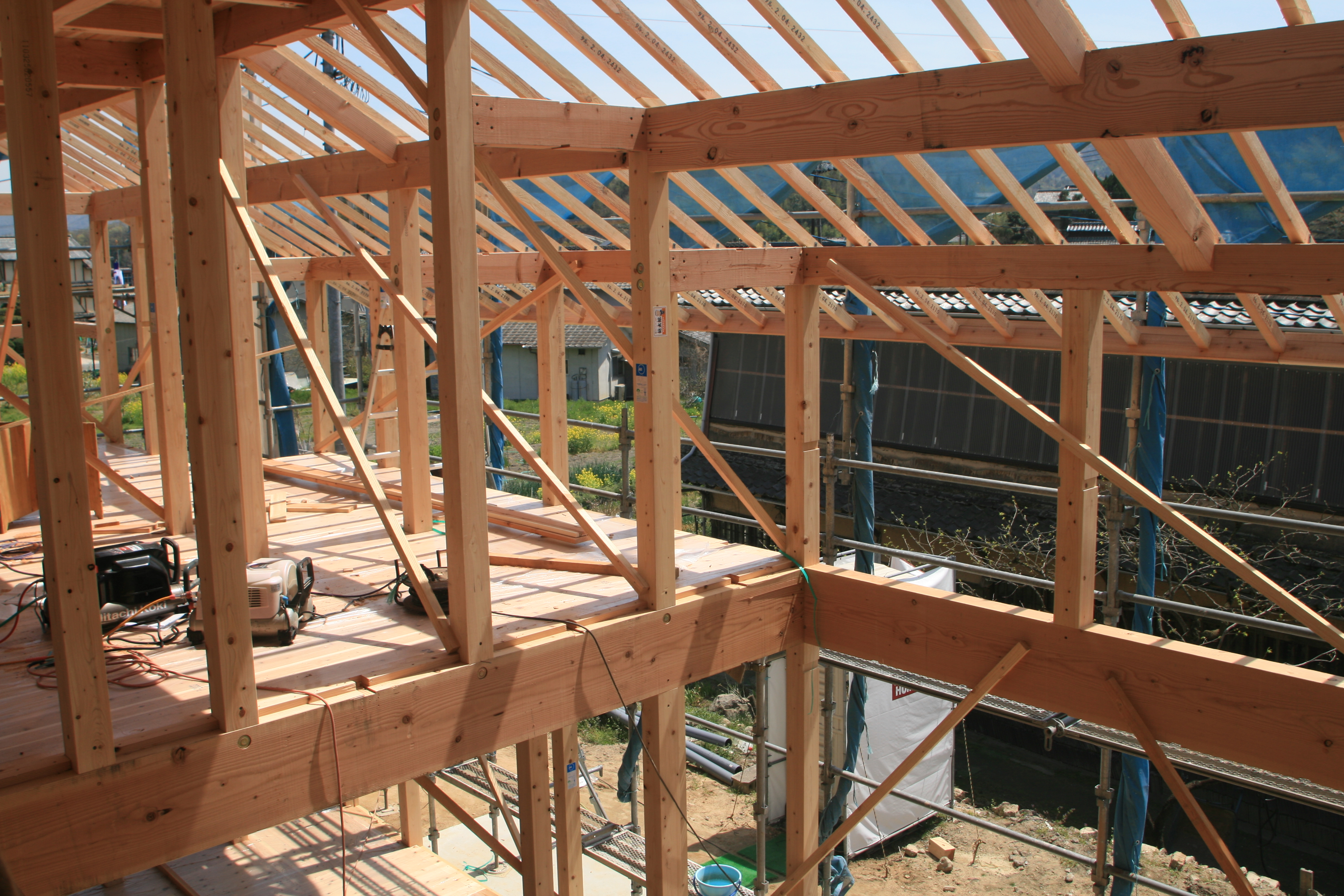 ドリフトピンを使用した、木材の結合。上棟時の撮影